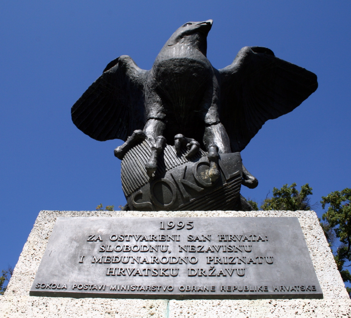 Maksimir, Zagreb